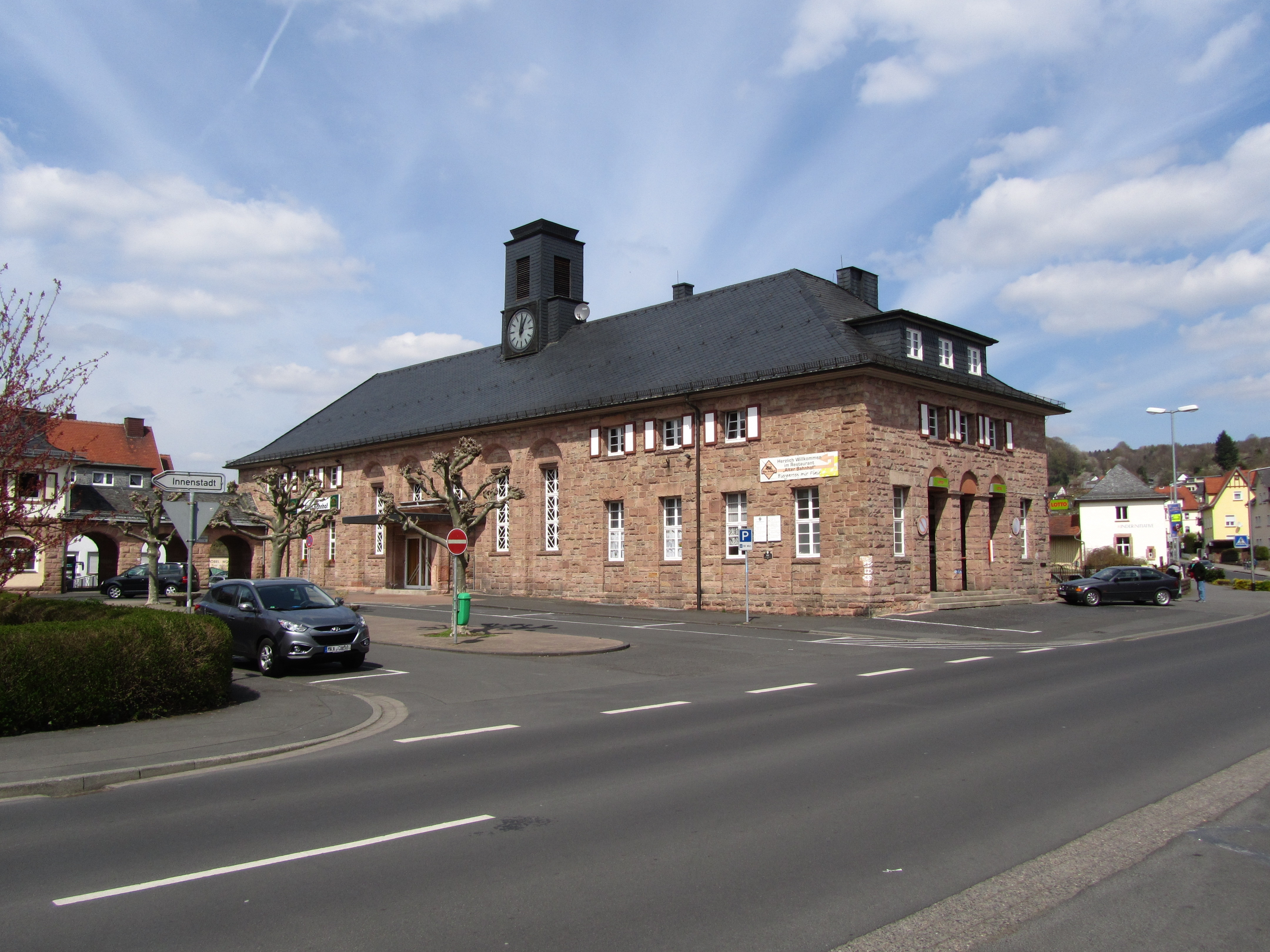 Der alte Bahnhof in Bad Orb